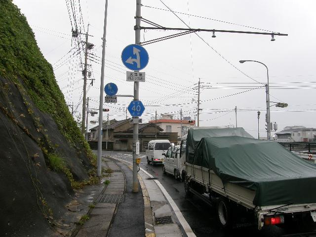 長崎県道40号線終点